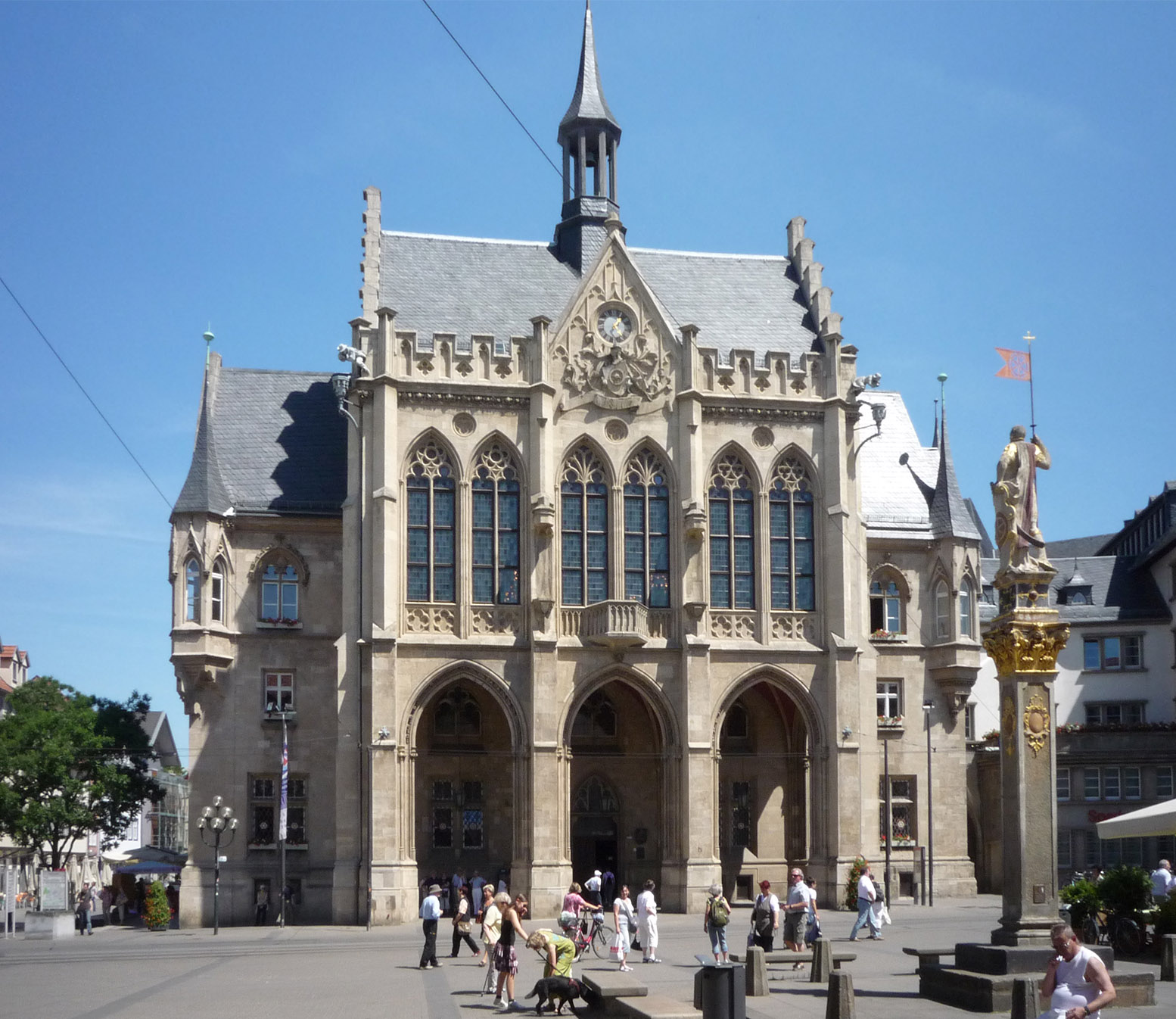 Erfurter Rathaus